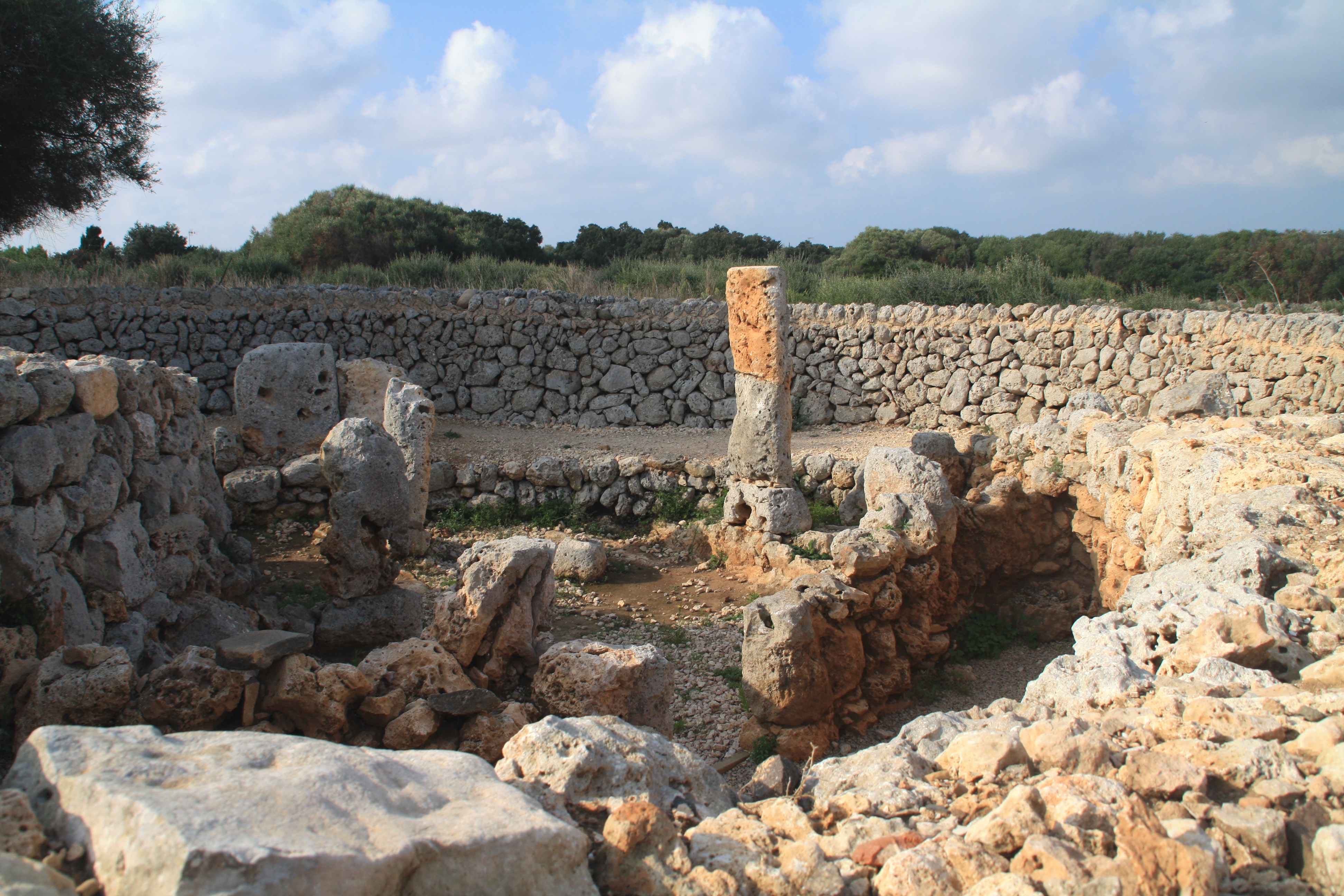 Reste eines Wohnhauses in Trepucó, Menorca